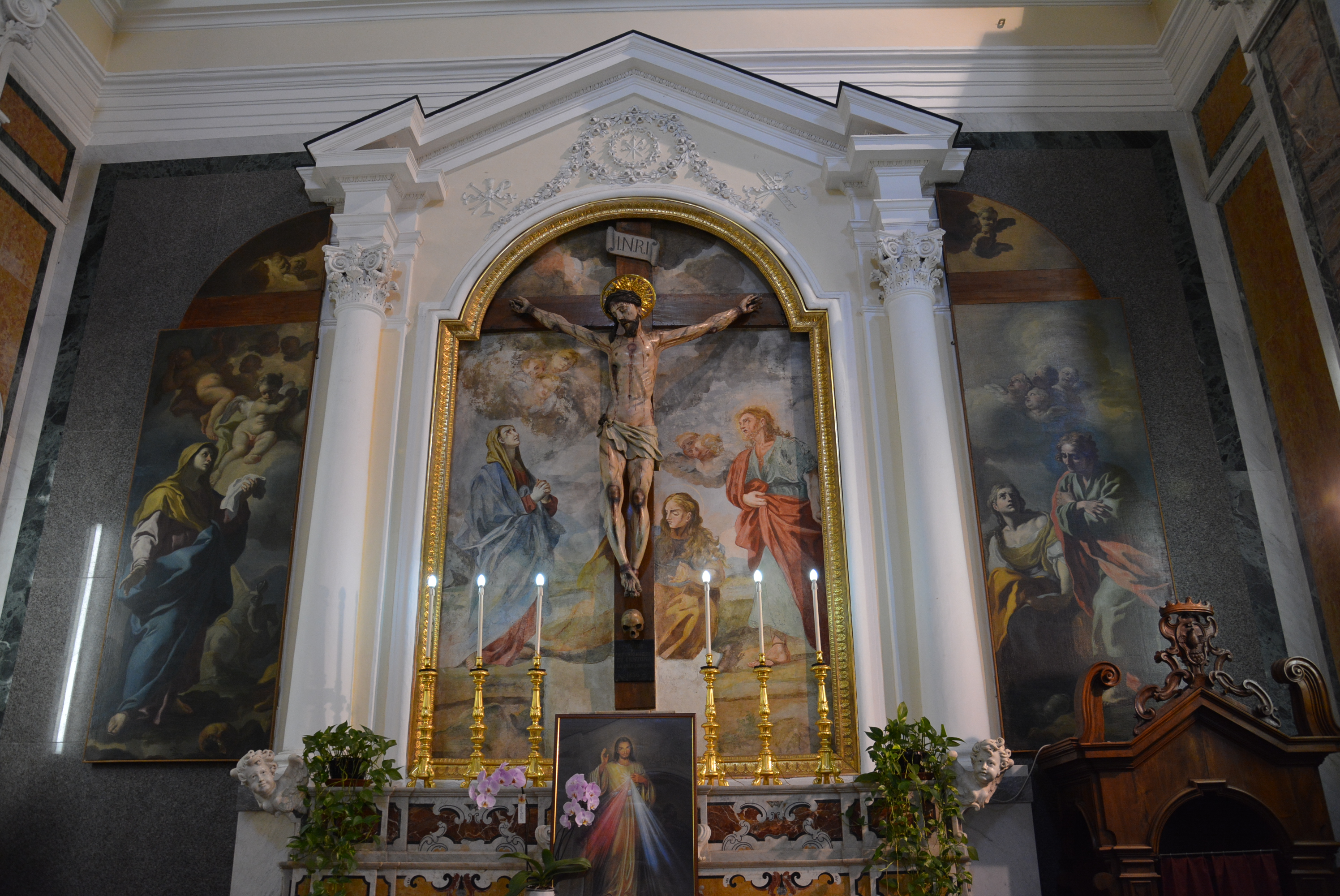 Chiesa dello Spirito Santo a Ischia